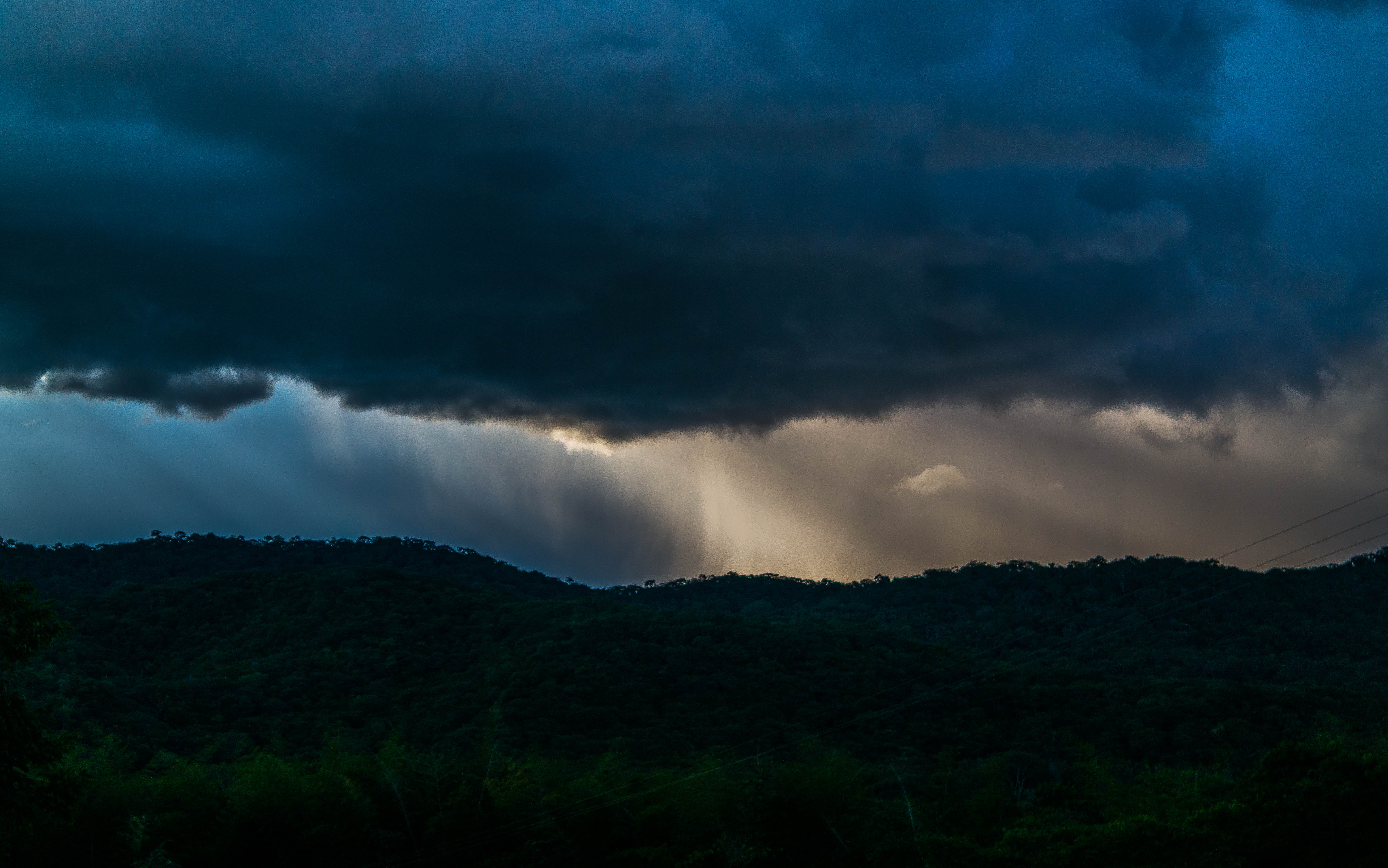 Câmera: Samsung nx1000 Lente: Samsung 20-50mm ISO: 200 exposição: 1/1600s f/5